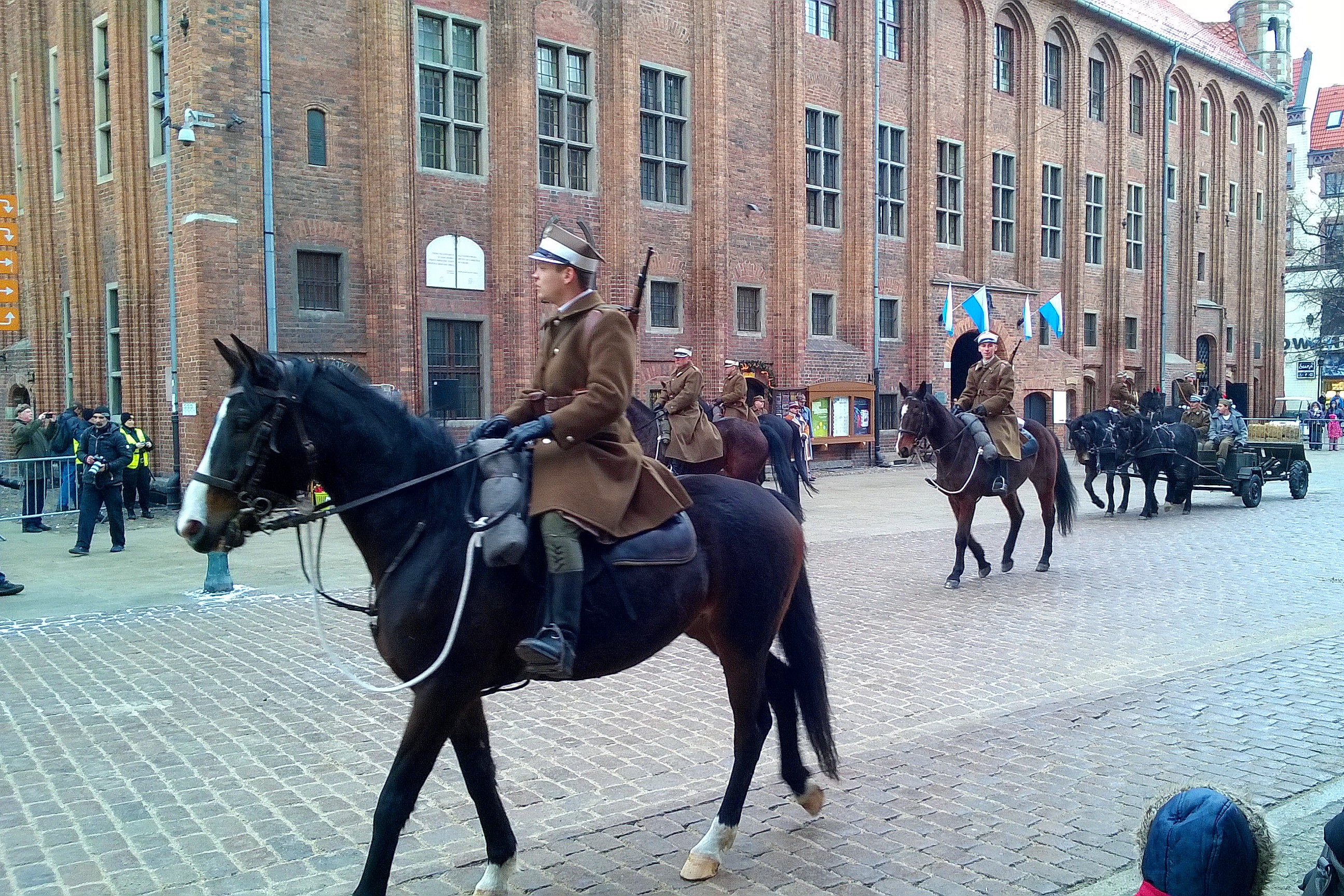 Inscenizacja wojskowa na Rynku Staromiejskim w Toruniu, która odbyła się w rocznicę wyzwolenia miasta przez gen. Józefa Hallera